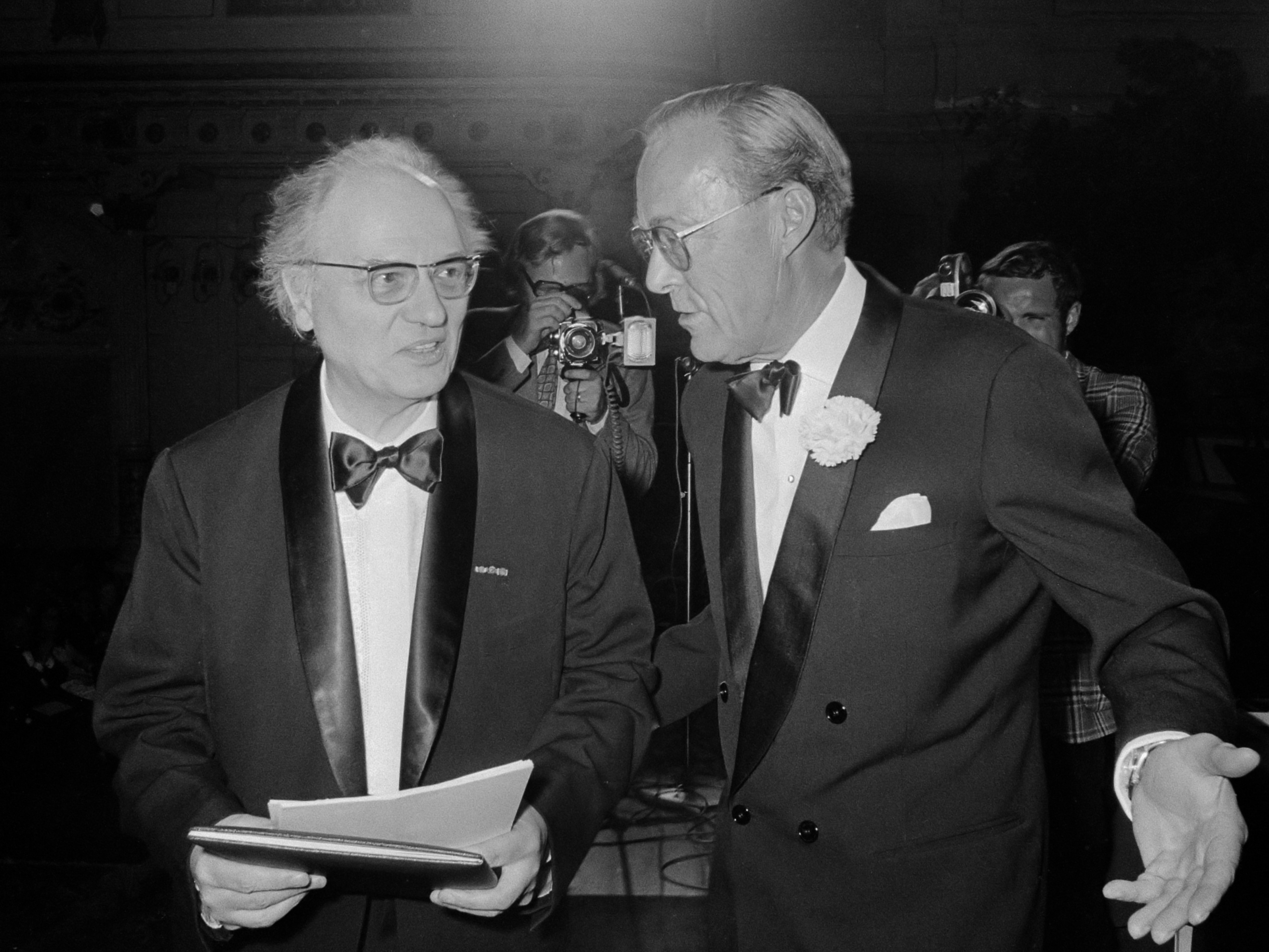 Prins Bernhard reikt Erasmusprijs uit aan Olivier Messiaen in Concertgebouw Amsterdam, links O. Messiaen en Prins Bernhard 25 juni 1971